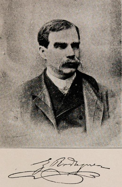 Zorobabel Rodríguez Benavides (Quillota, 4 de octubre de 1839 - Valparaíso, 29 de septiembre de 1901)1 fue un abogado, político, periodista y escritor chileno. Fue redactor del diario El Independiente y fundador del diario La Unión. En el ámbito político, militó en el Partido Conservador, siendo diputado propietario por Chillán, Santiago y Linares entre 1870 y 1891. En 1875, publicó el primer libro sobre modismos chilenos. Además, fue superintendente de aduanas en Valparaíso desde 1891 hasta 1901.2